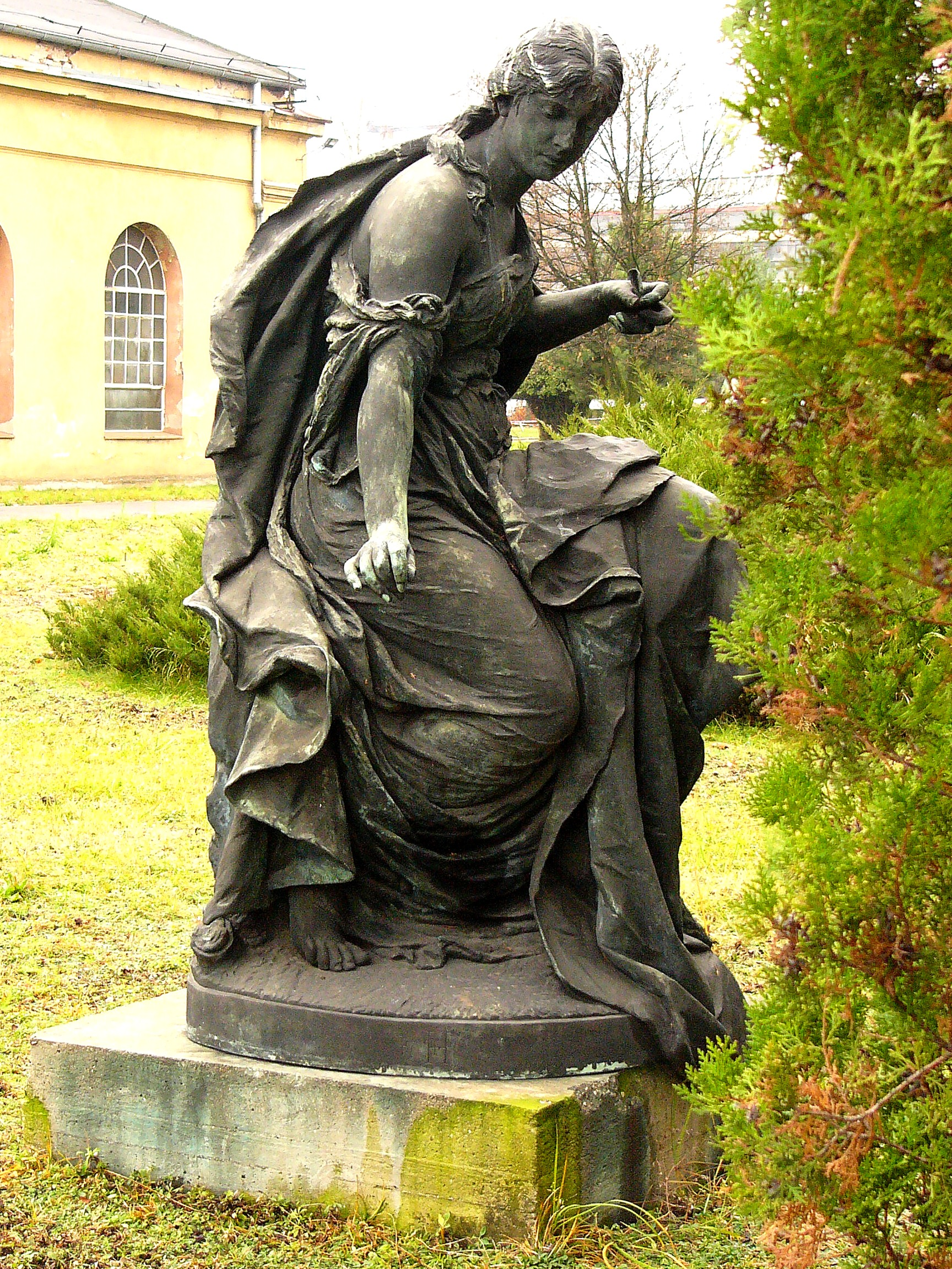 Gliwice, Figura alegoryczna – figura kobieca, odlew w brązie, neobarokowa z 1892 roku, pochodząca ze zwieńczenia grobowca rodzinnego na starym cmentarzu przy ulicy Kozielskiej – obecnie teren GZUT